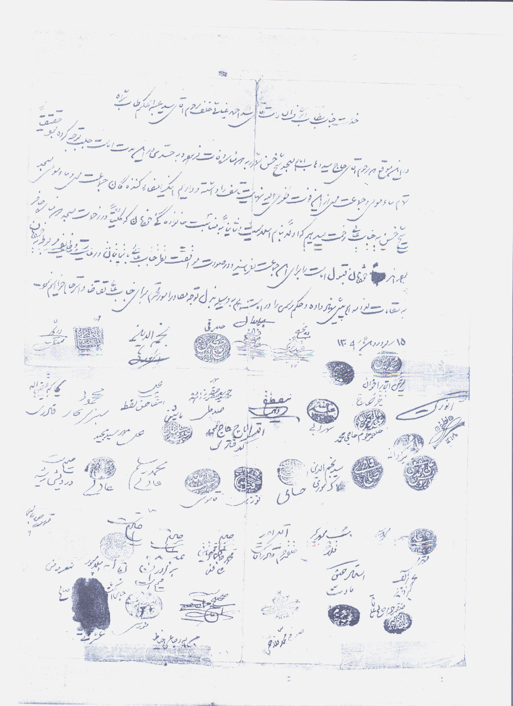 سند وقف روستای بهرام